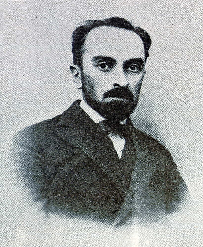 Adam Skwarczyński - portret